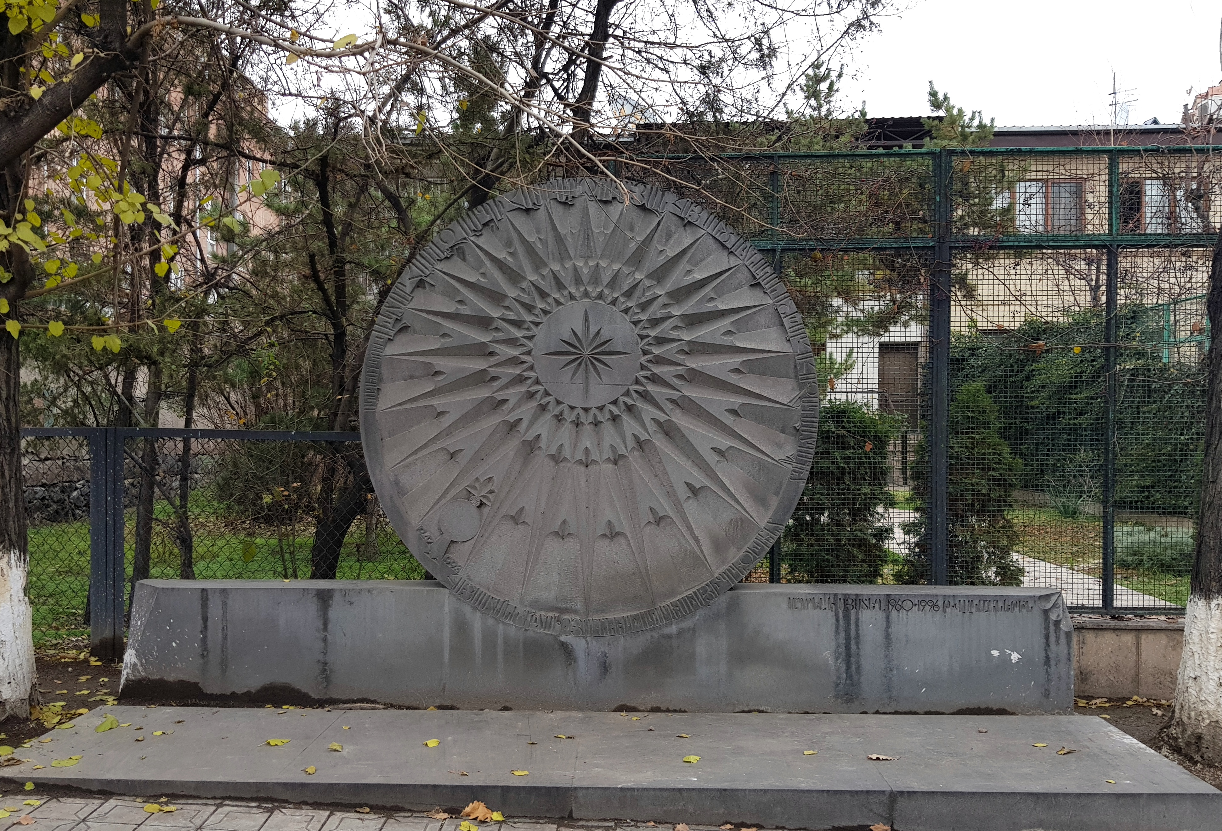 Հուշակոթող Վիկտոր Համբարձումյանին, Բաղրամյան փողոց, Երևան 6/38.1